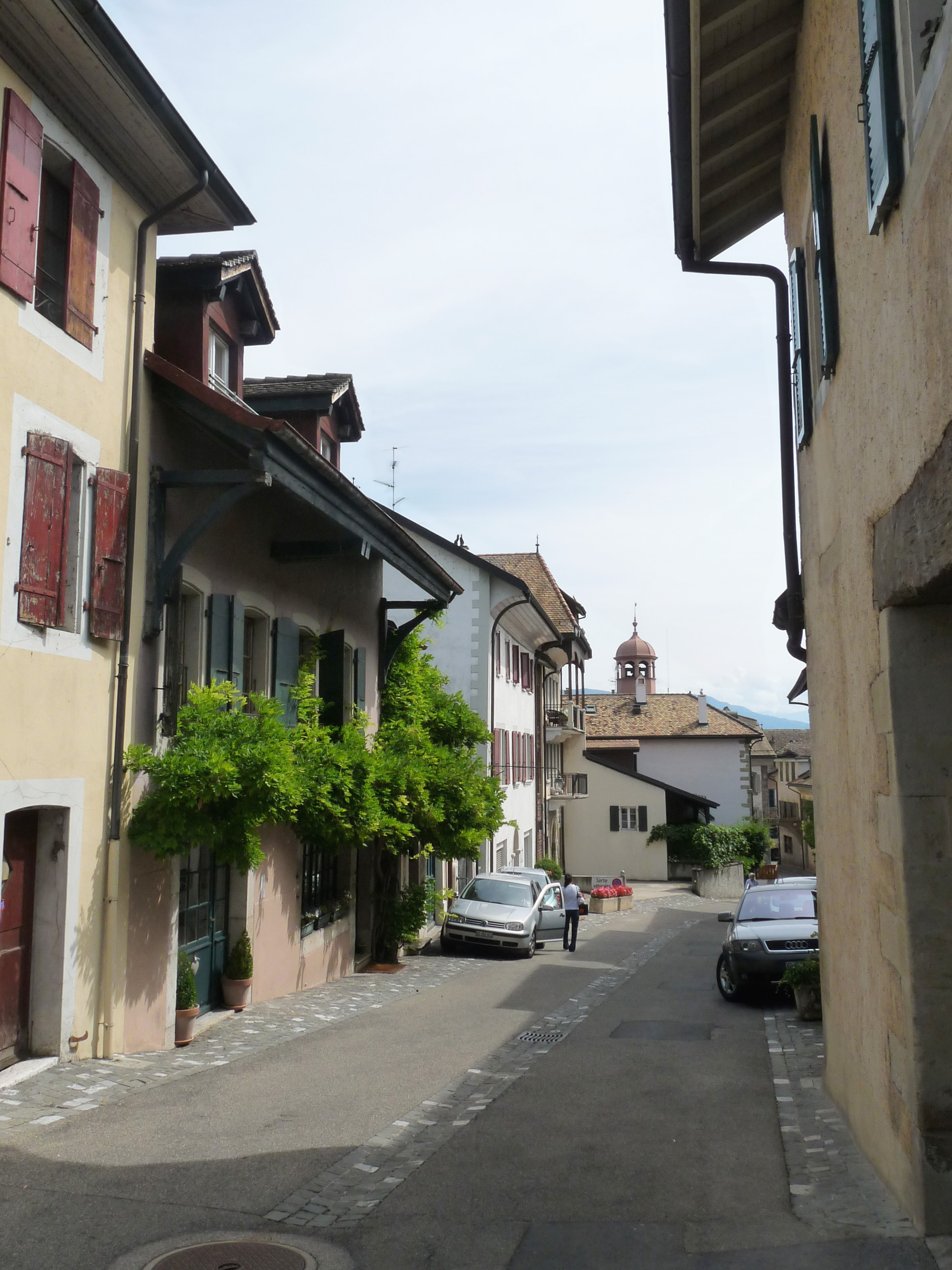 Une rue de Coppet (Vaud, Suisse)